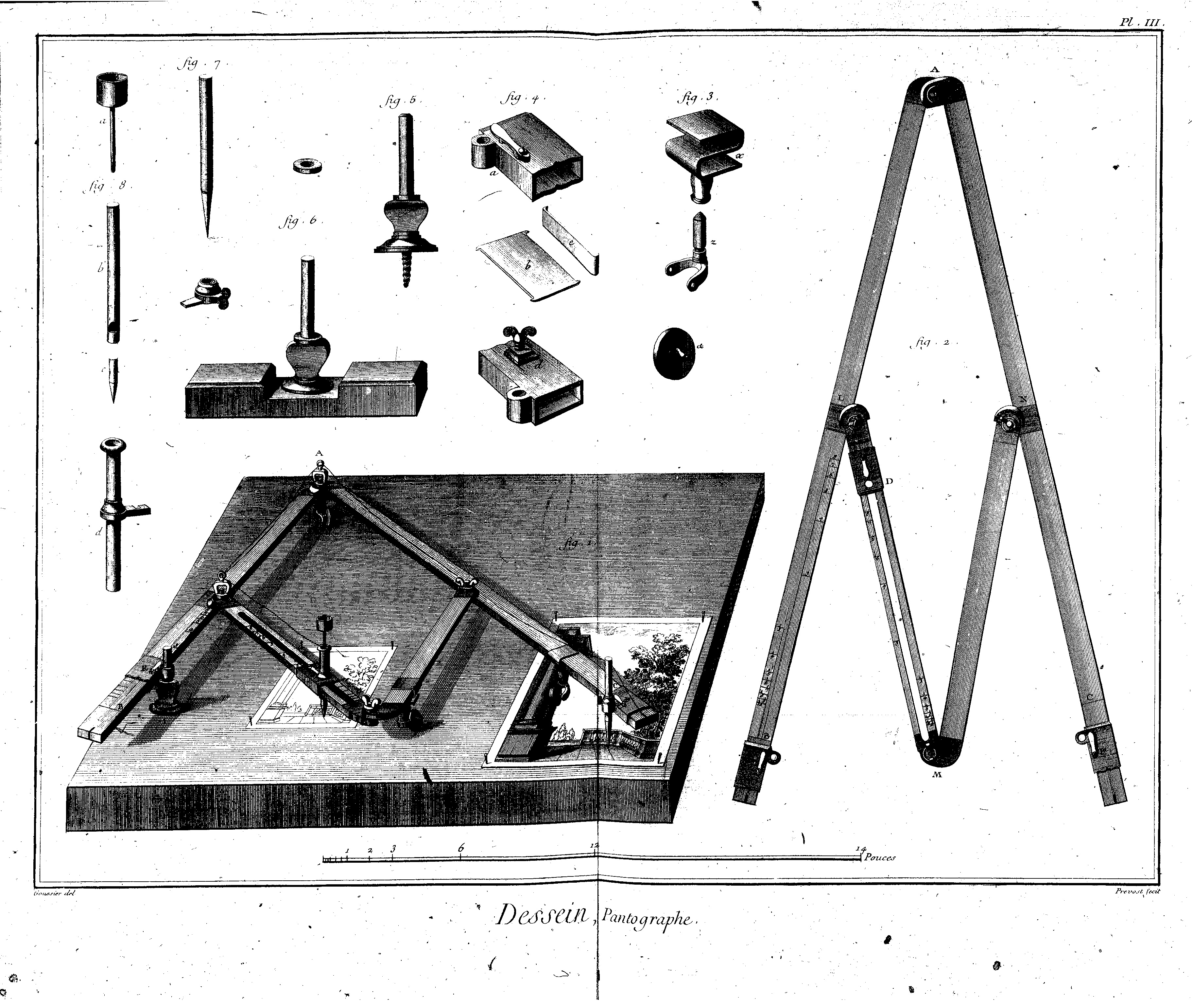 Planches de l'Encyclopédie de Diderot et d'Alembert, volume 2b